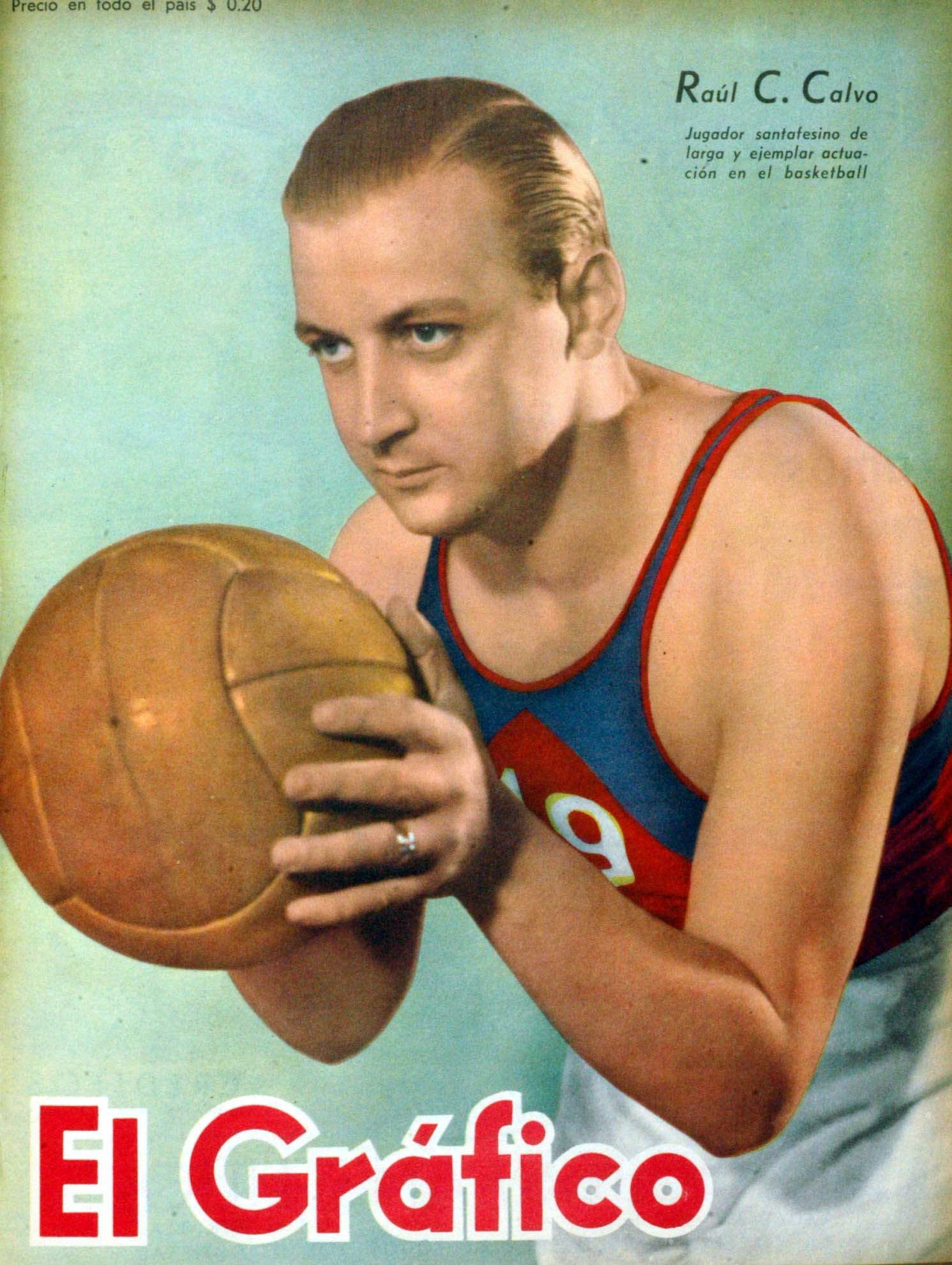 El Grafico del 07 de Marzo de 1947. Edicion 1443